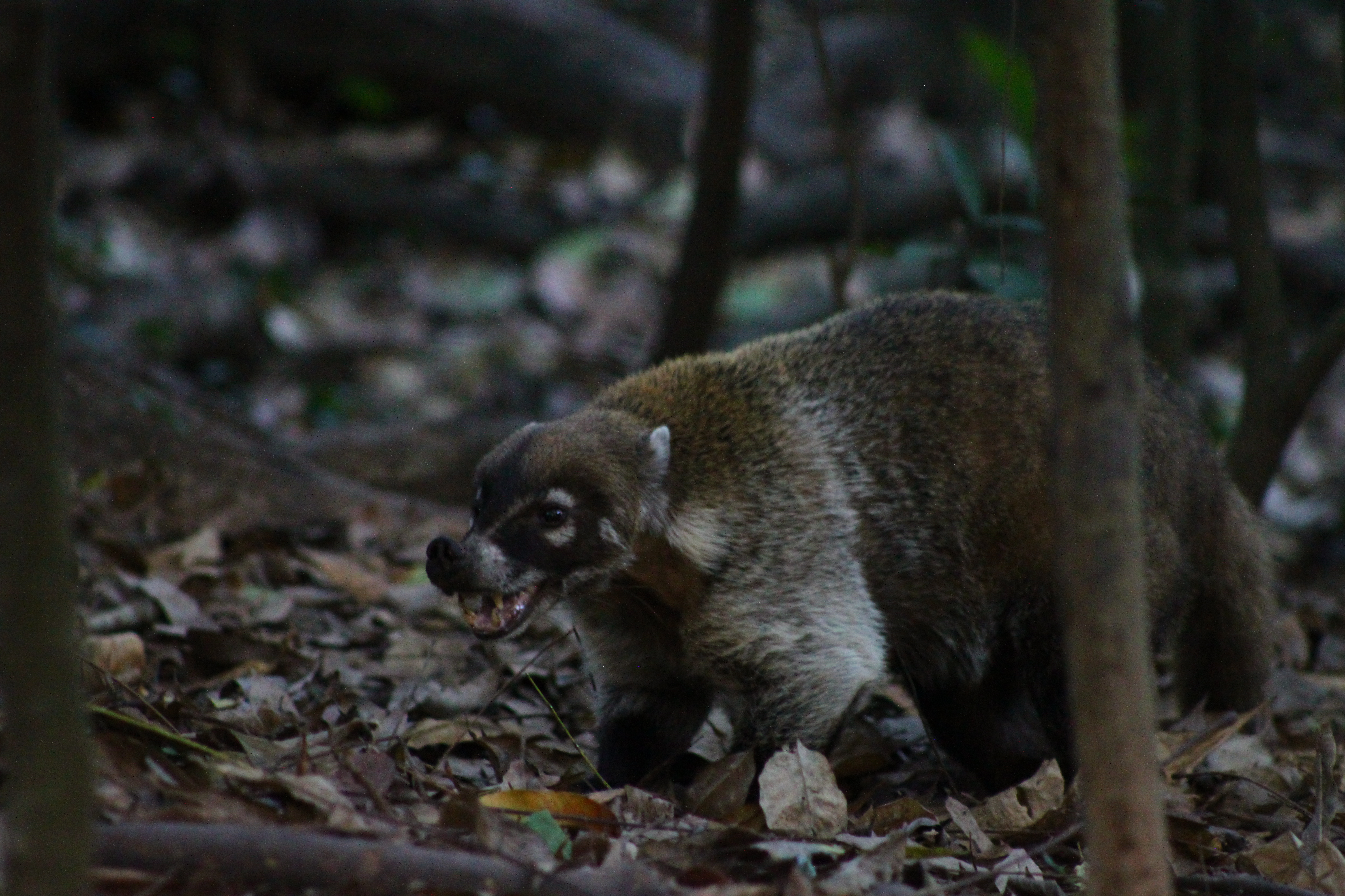 coatí mostrando sus afilados colmillos